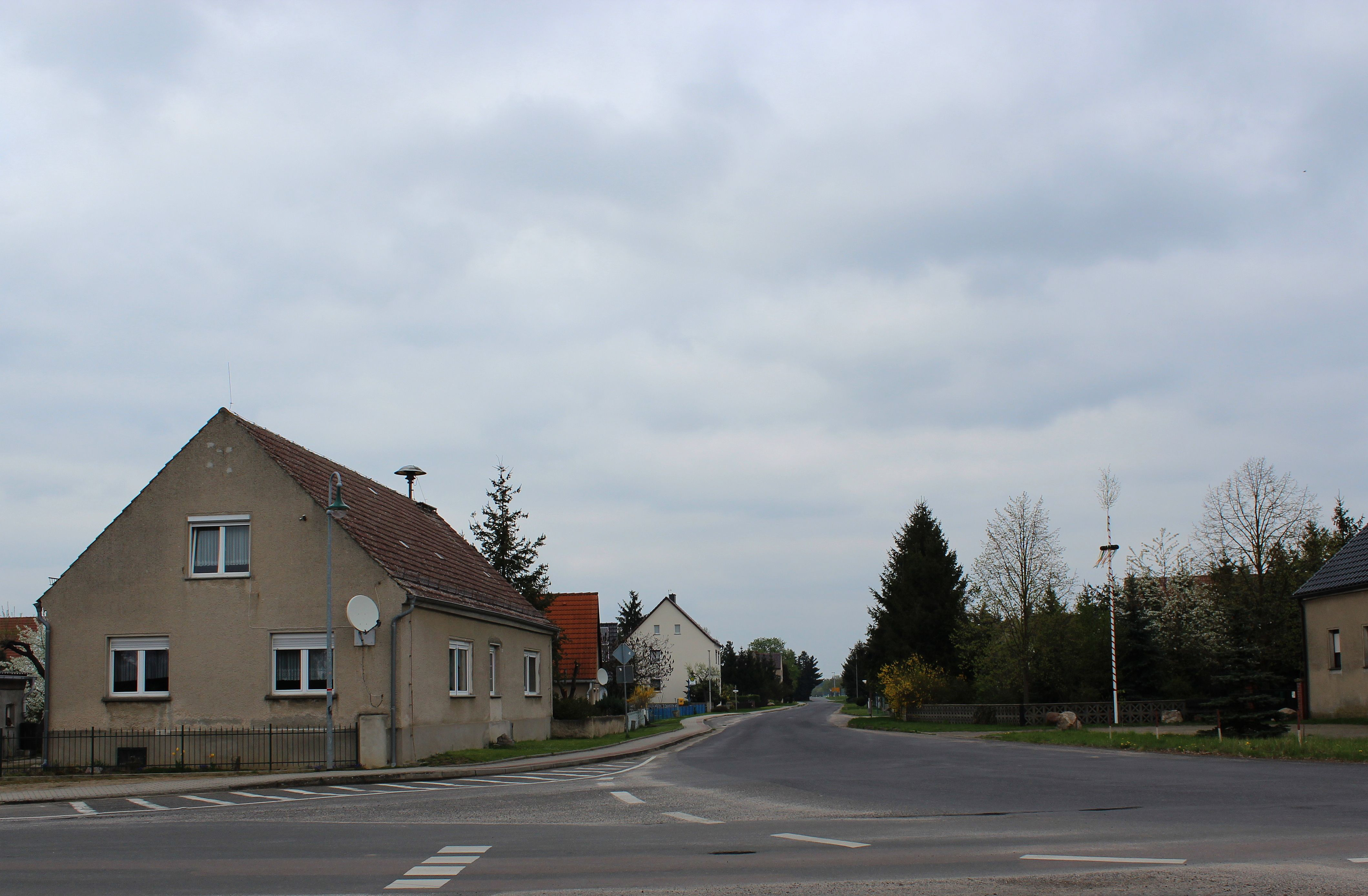 Bönitz.